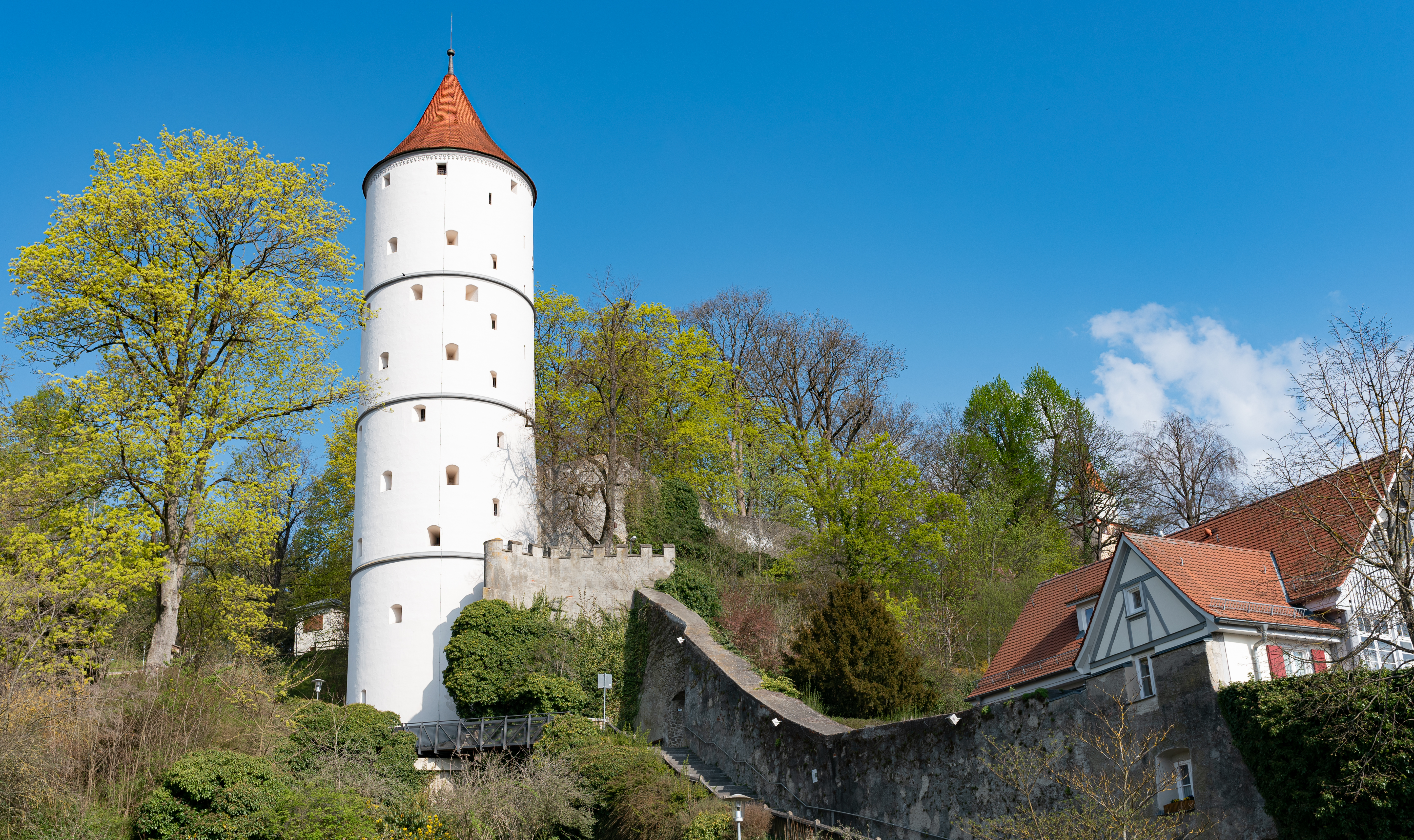 Weißer Turm mit Teilen der Stadtmauer von Biberach an der Riß, Deutschland